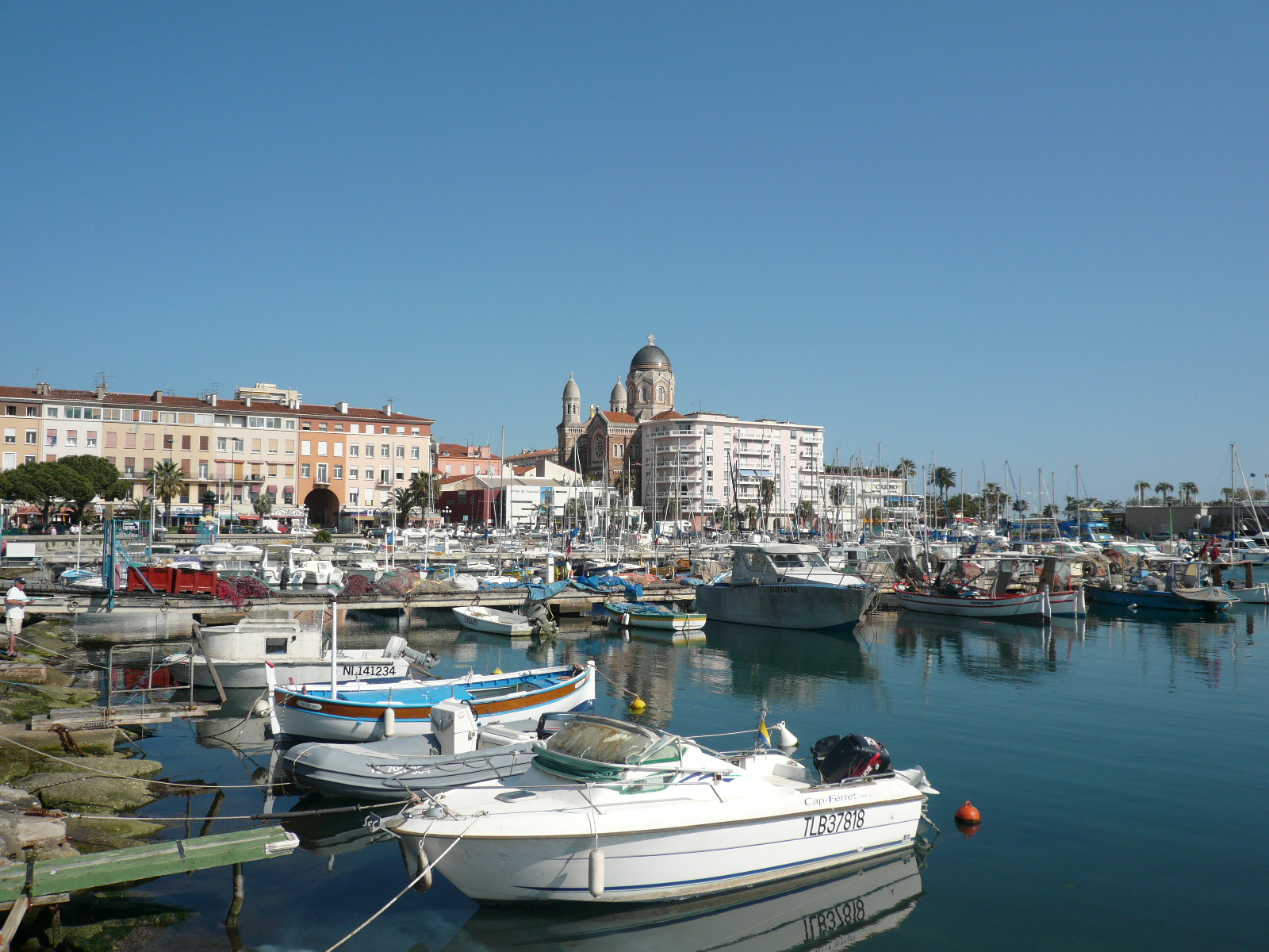 Saint-Raphaël et son port